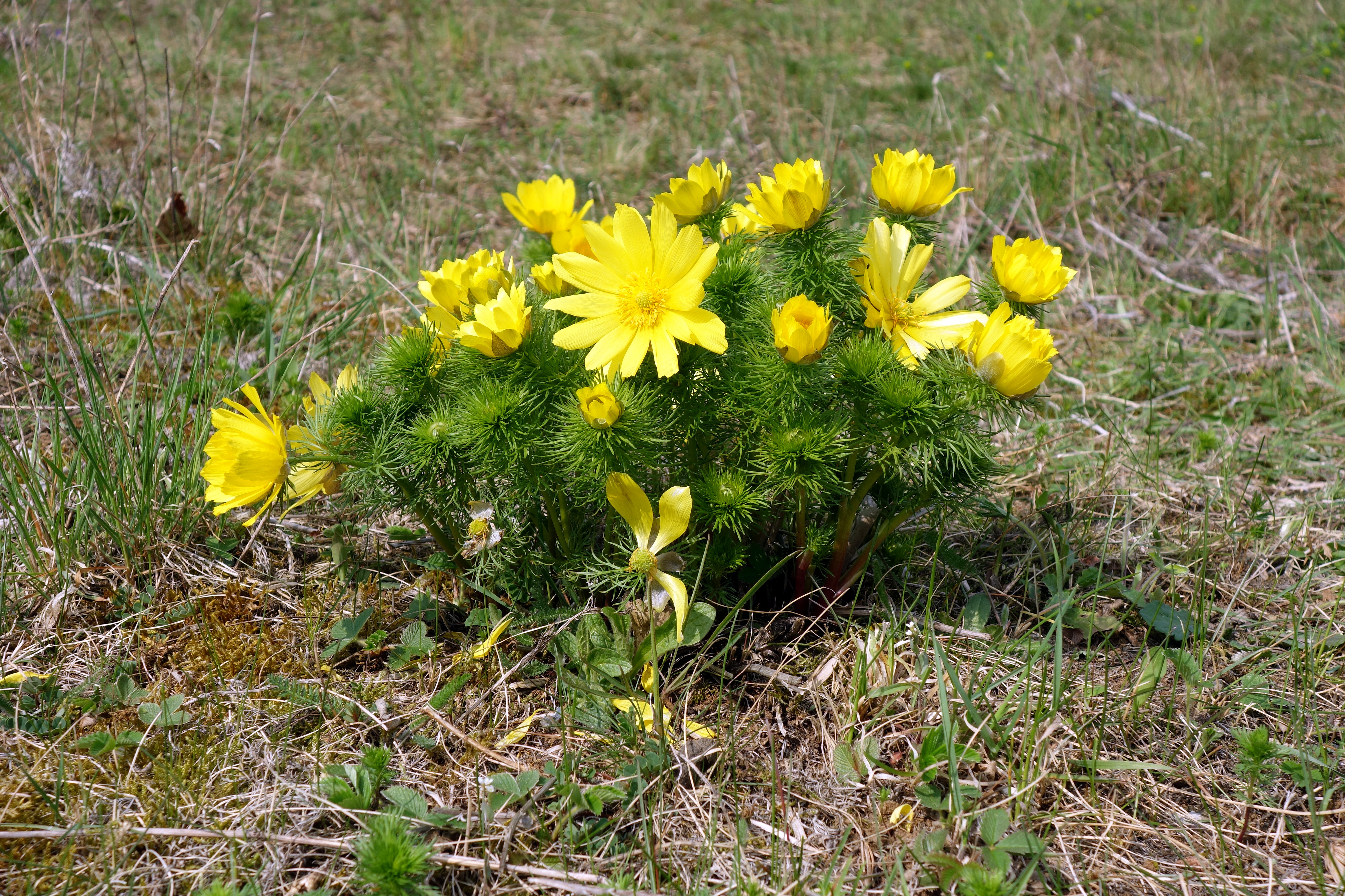 Adonisröschen